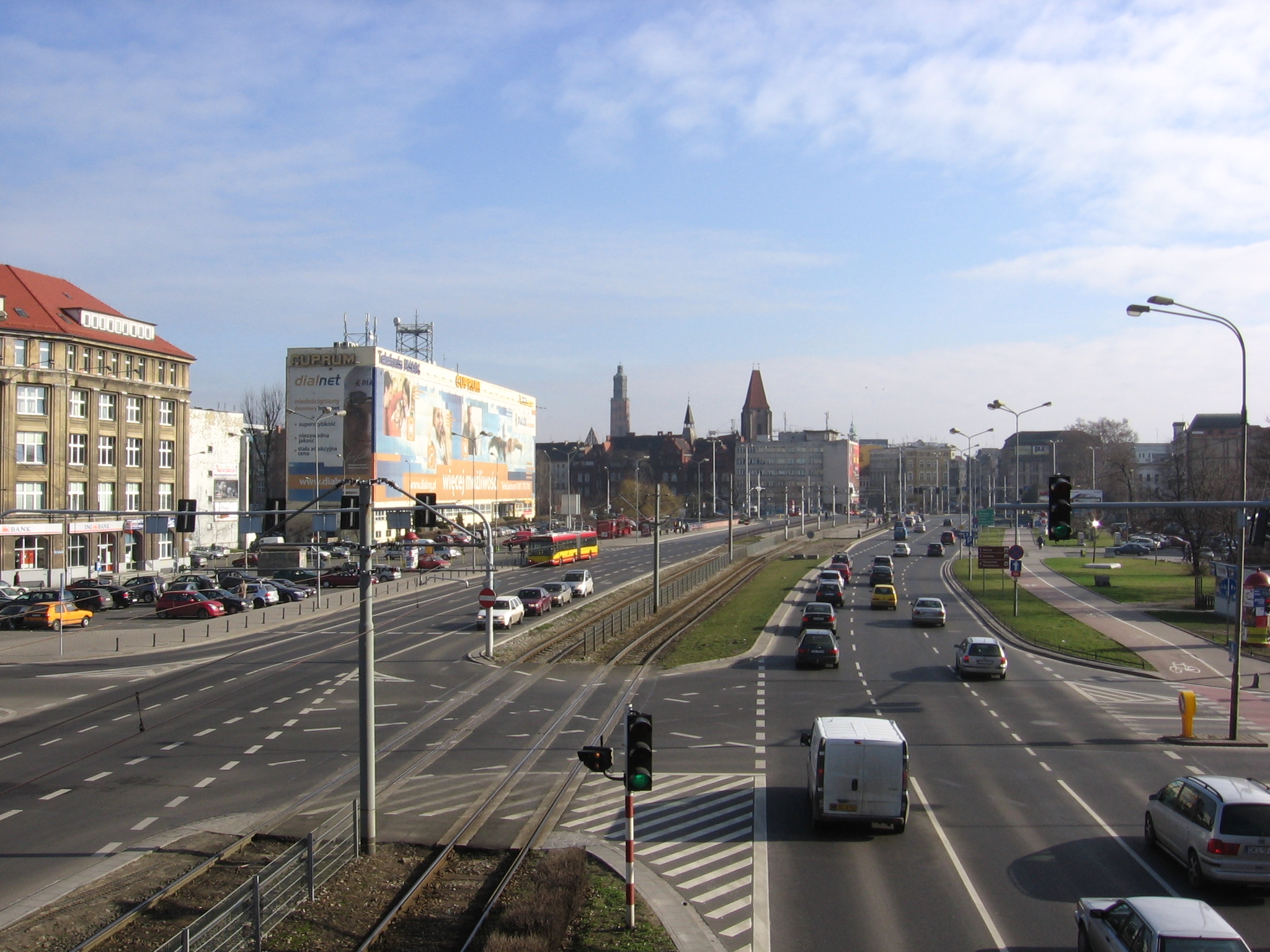 plac Solidarności, ul. Legnicka i plac Jana Pawła II we Wrocławiu. Na skraju po lewej budynek Zarządu Regionu NSZZ Solidarność Dolny Śląsk (pl. Solidarności 1-3-5); dalej z lewej biurowiec "Cuprum" (pl. Jana Pawła II nr 1), w oddali z lewej wieża kościoła św. Elżbiety (garnizonowego), pośrodku kadru, nieco bliżej, nakryta czterospadowym dachem wieża soboru Narodzenia Przenajświętszej Bogurodzicy; pod nią jasny budynek poradni przyszpitalnej przy Wojewódzkim Szpitalu im. J. Babińskiego (pl. Jana Pawła II nr 8); na skraju zdjęcia po prawej słabo widoczny jasny budynek Akademii Muzycznej (pl. Jana Pawła II nr 2). Zdjęcie wykonane z kładki nad dwujezdniową ulicą Legnicką, na pierwszym planie skrzyżowanie z ulicą Nabycińską (w prawo) i Rybacką (w lewo).